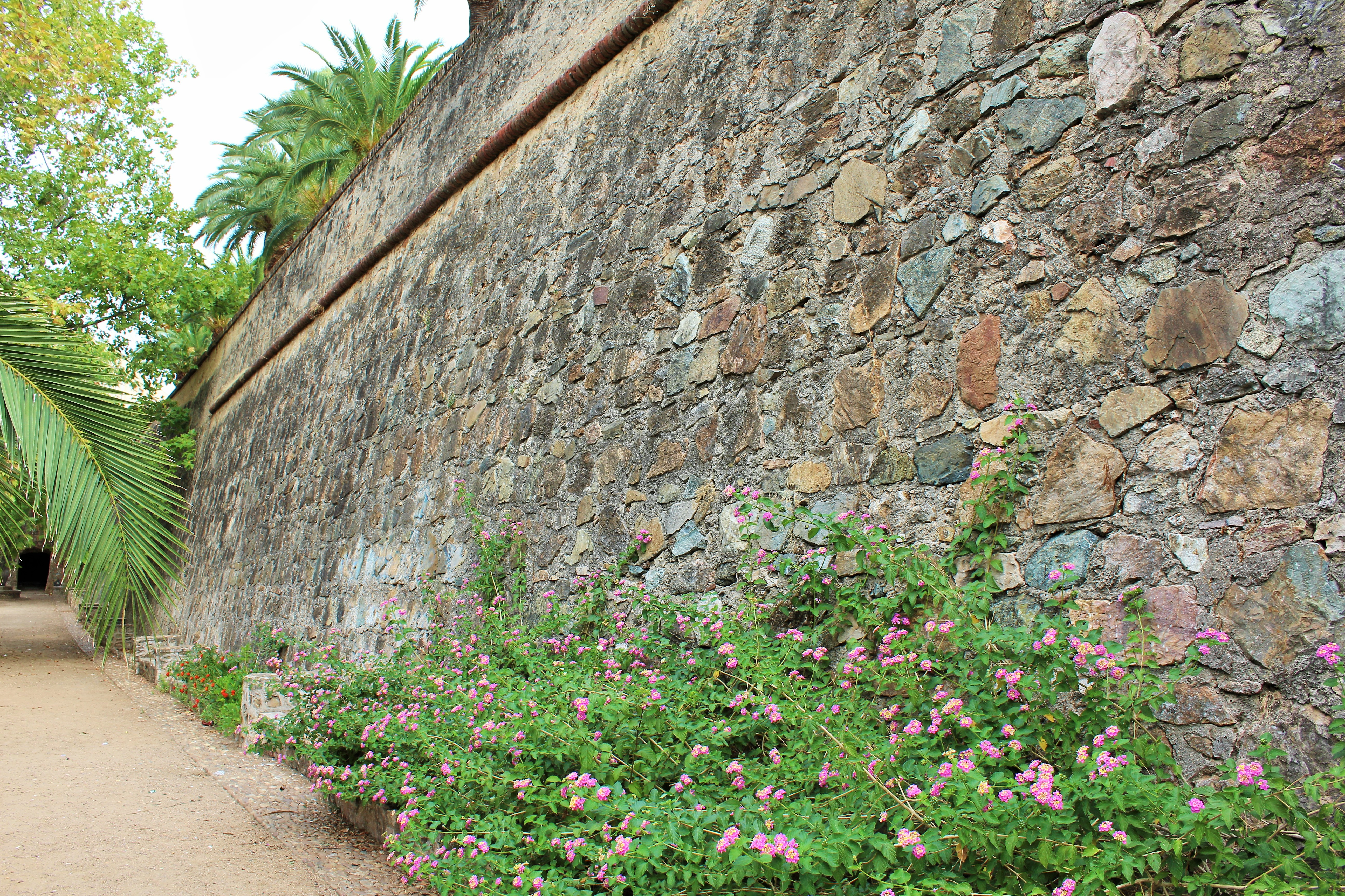 Potente lienzo al norte.